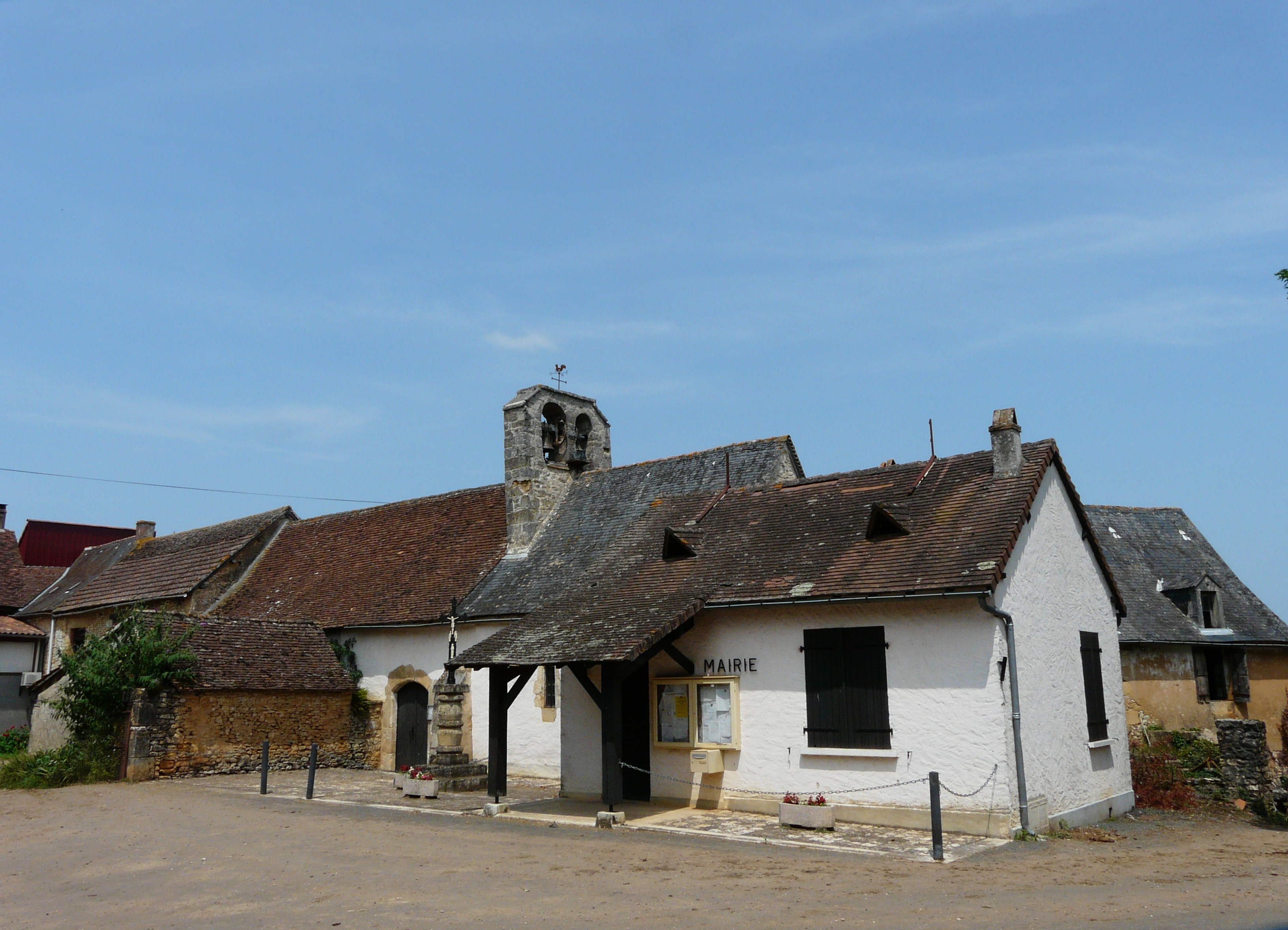 L'église et la mairie de Temple-Laguyon, Dordogne, France.